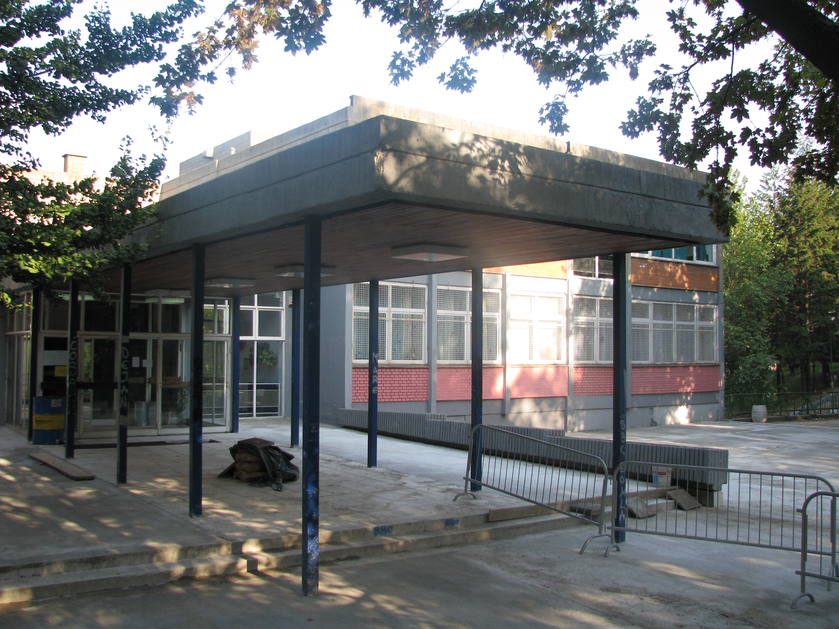 ОШ Филип Вишњић (Карабурма) Licensing